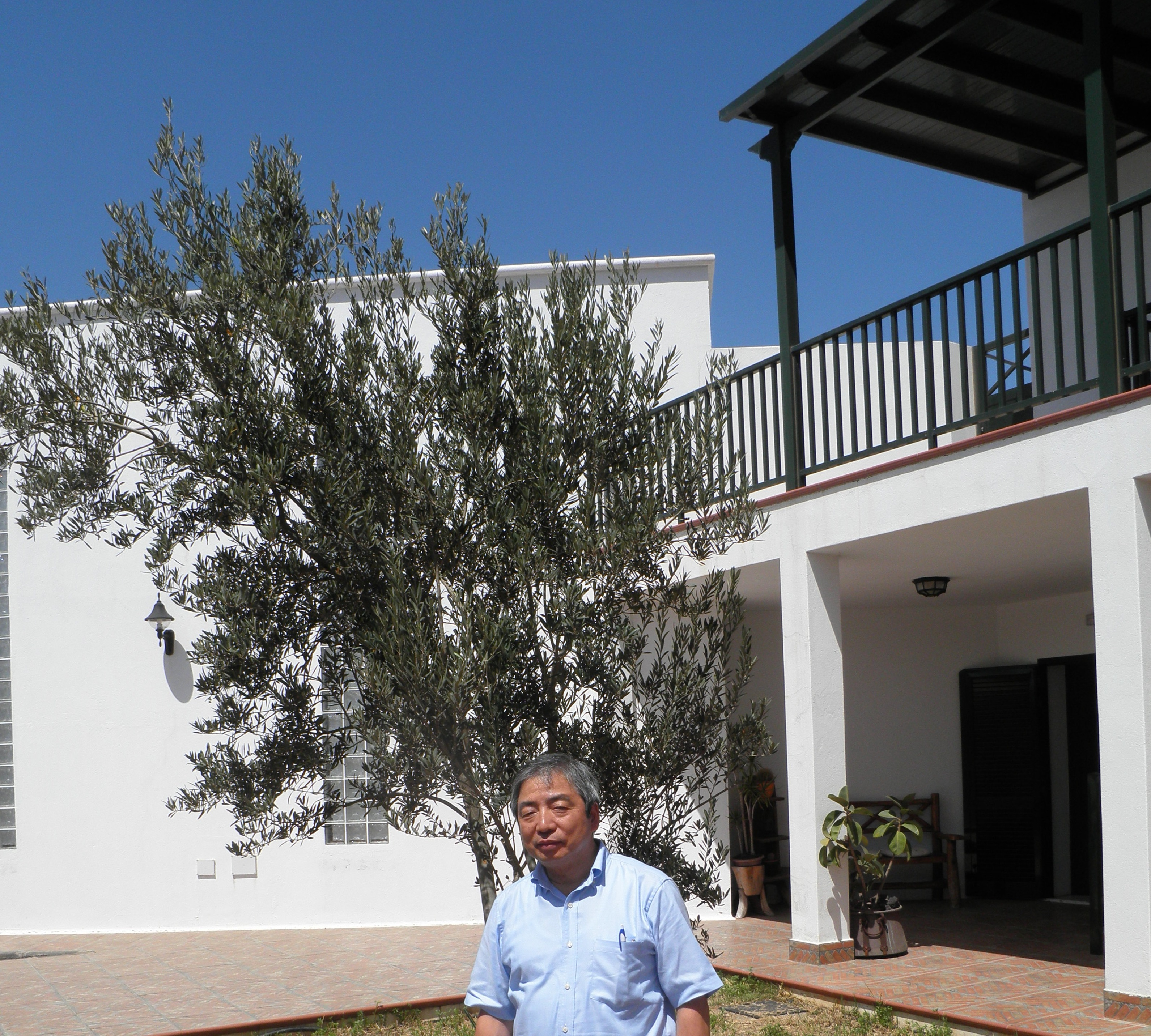 ランサローテのサラマーゴ邸訪問